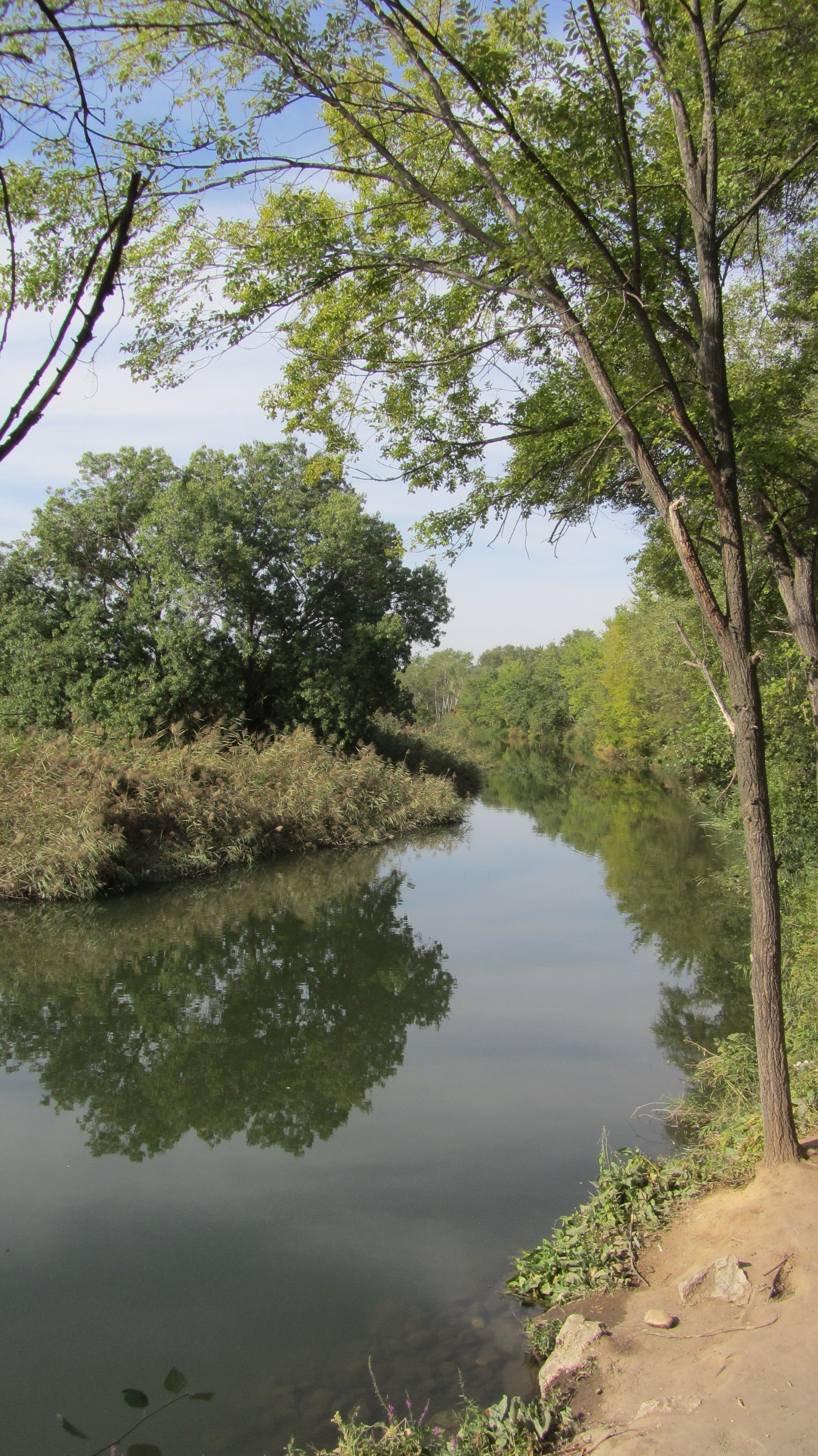 Rivera del Henares, a su paso por Alcalá de Henares (Comunidad de Madrid - España) en la zona denominada El Val. This is a photography of a Special Area of Conservation in Spain with the ID: ES3110001. Natura2000 entry, EEA entry